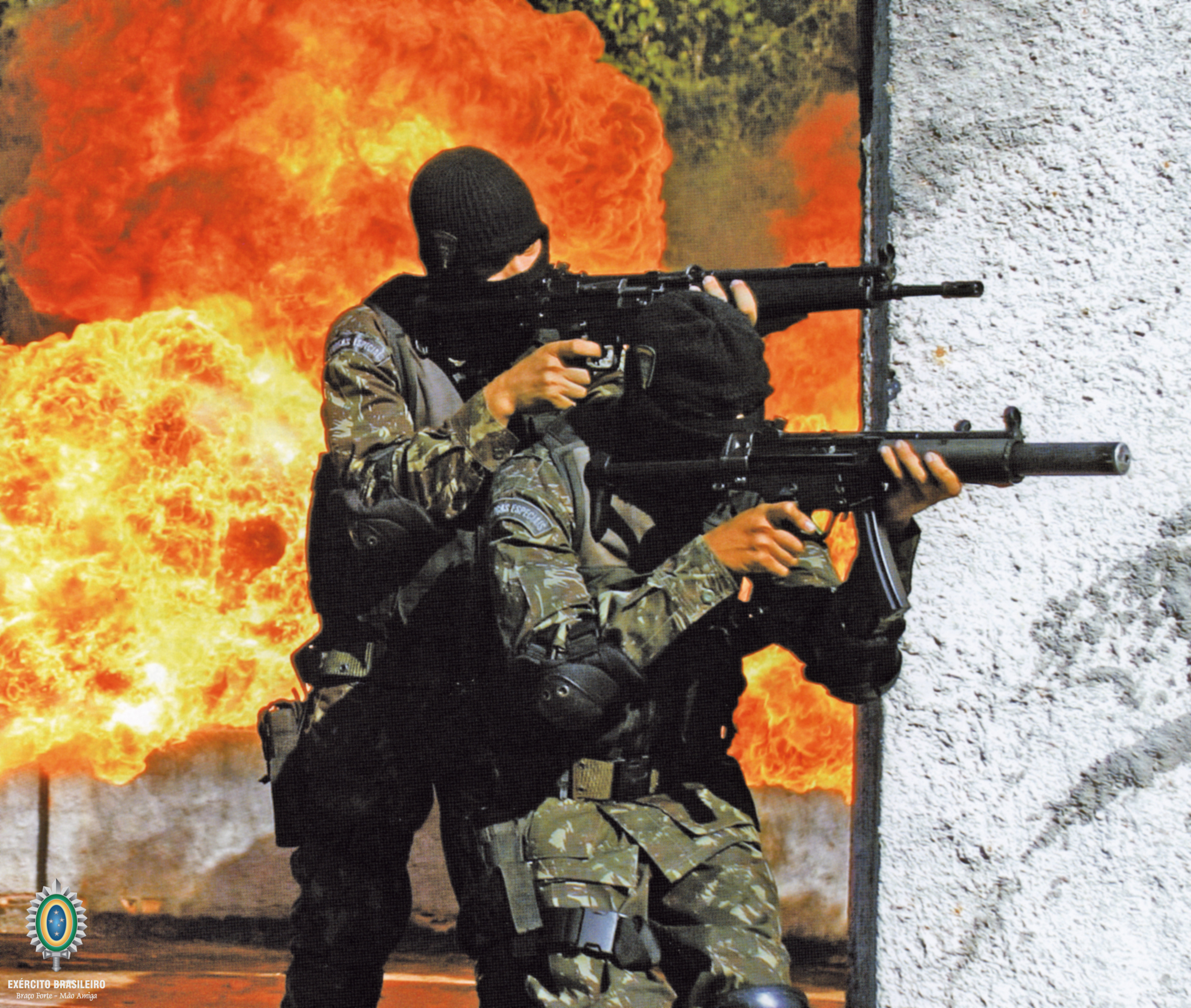 Comandos, Forças Especiais, combatente, Exército, Tiro instintivo caatinga, paraquedistas, atirador, sniper, mergulhadores